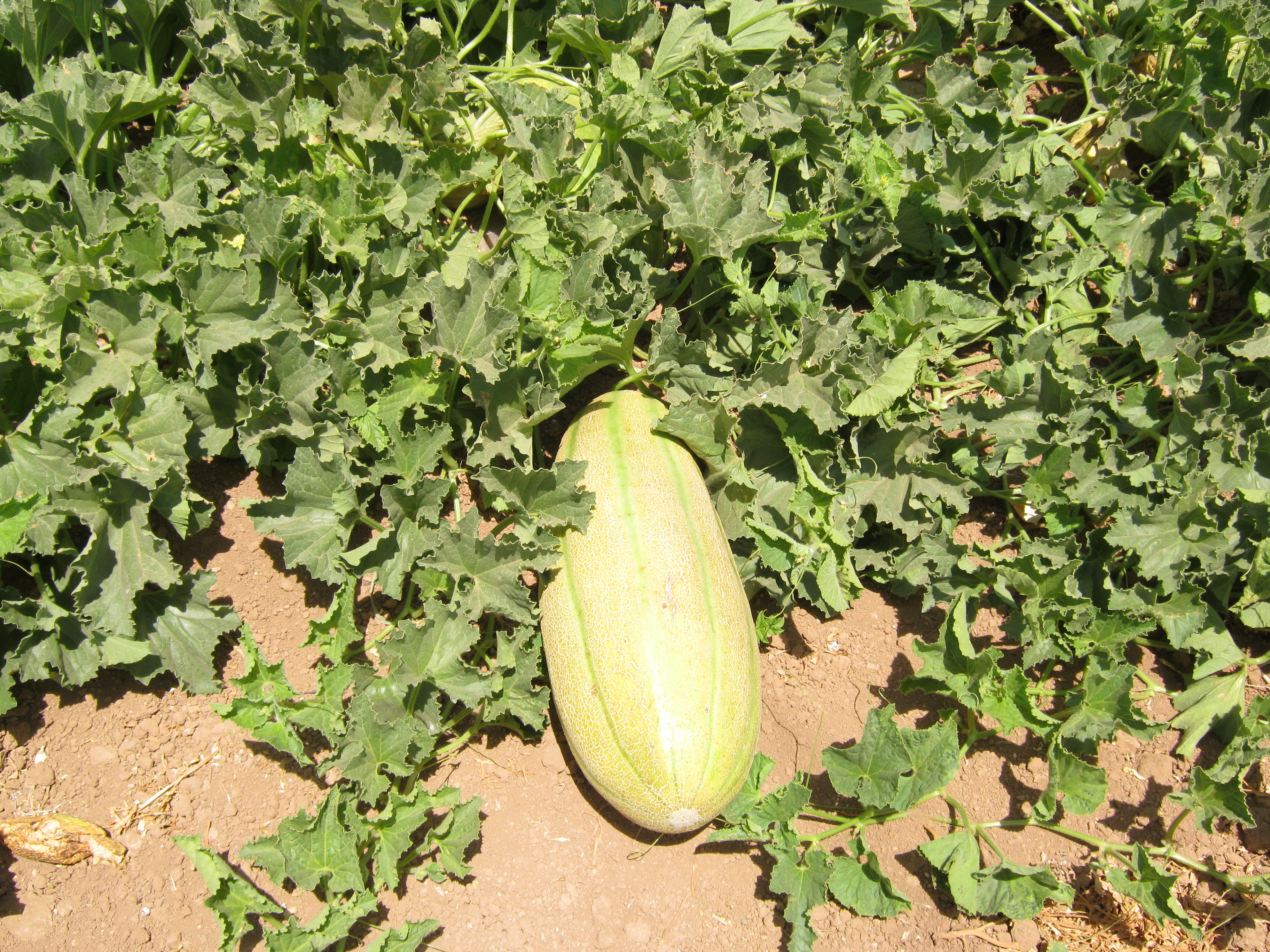 خربزه محصول بهار